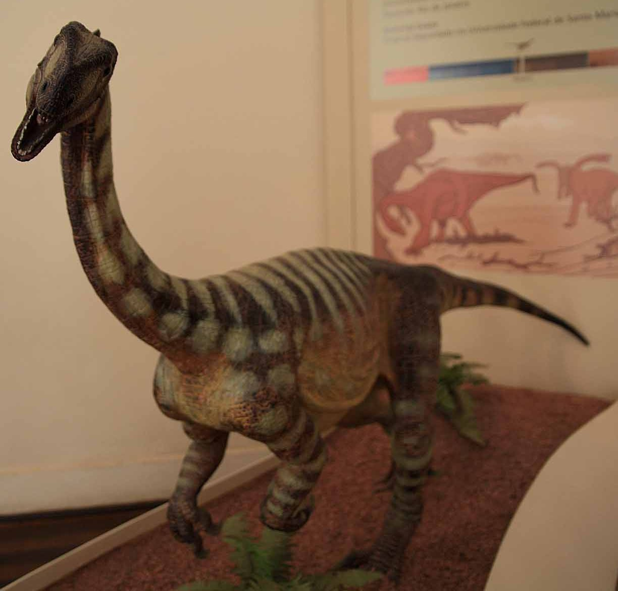 Unaysaurus. Museu Nacional da Universidade Federal do Rio de Janeiro, na Quinta da Boa Vista, Rio de Janeiro, Brasil.